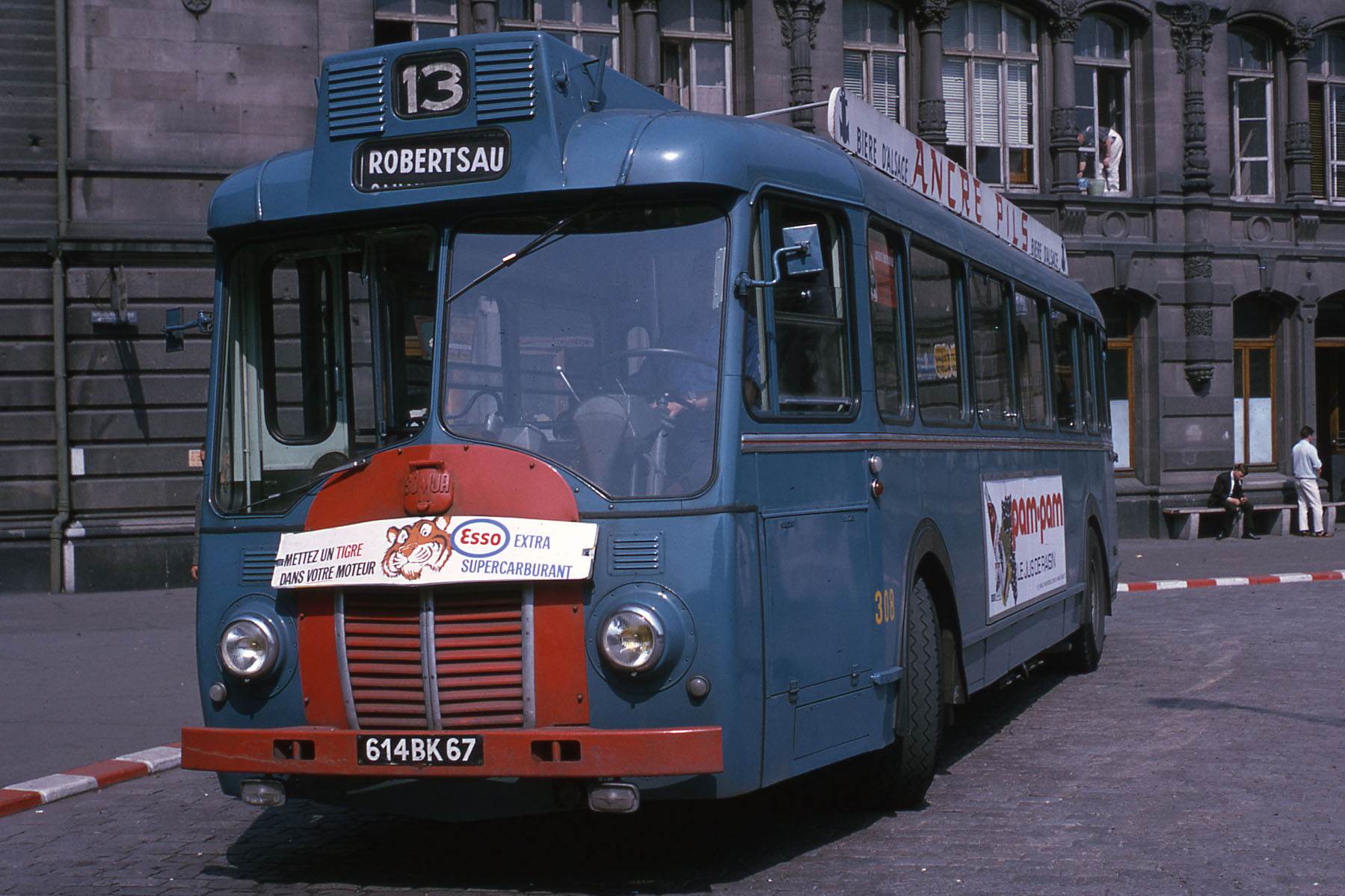 Autobus Somua type OP5/2 de la CTS sur la ligne 13, place de la gare de Strasbourg, en 1965. Ce type de bus a été construit au début des années 1950 et était doté d'un moteur Somua-Panhard de 100 ch.